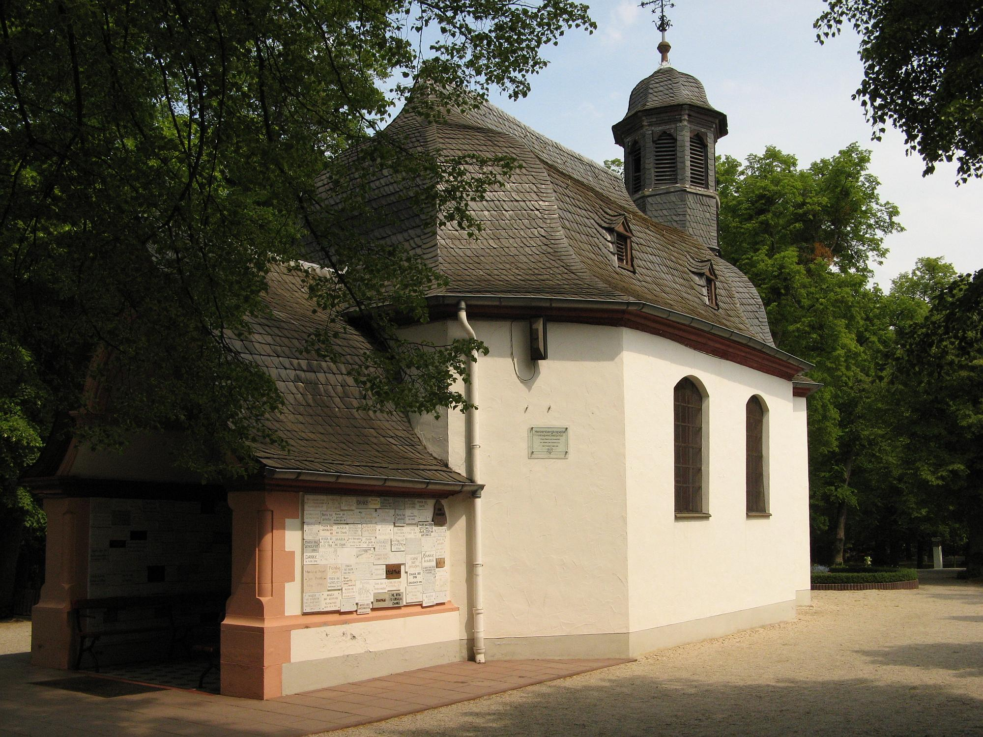 Herzenbergkapelle in Hadamar, erbaut 1676